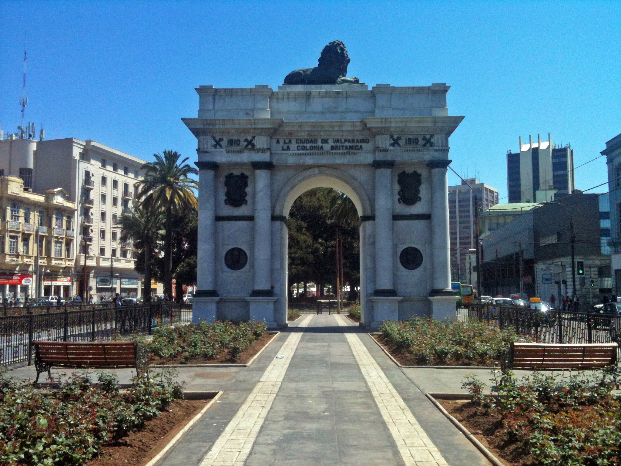 Monumento donado por la colonia británica a la ciudad de Valparaíso, Chile.